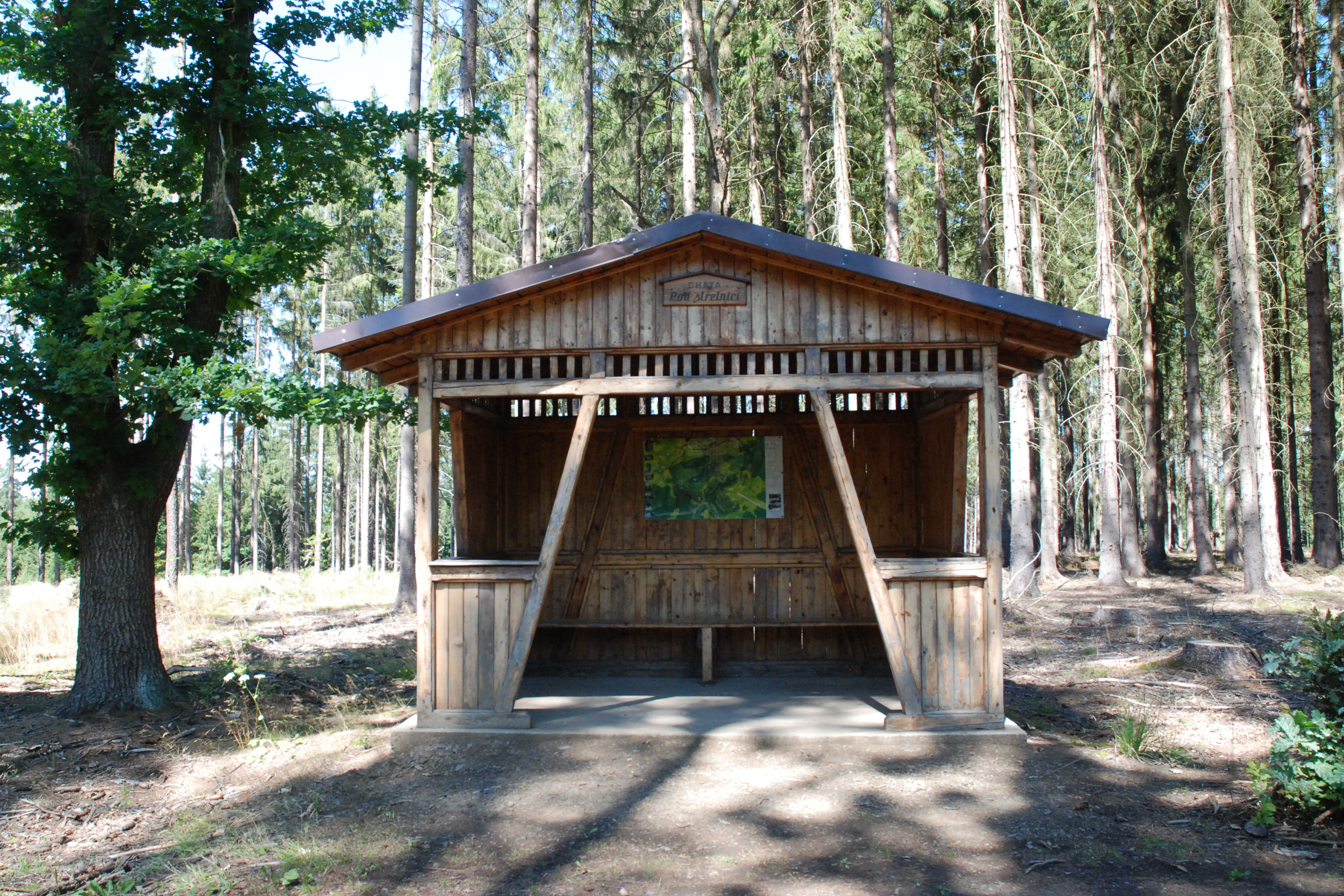 Chata Pod Střelnicí v karlovarských lázeňských lesích